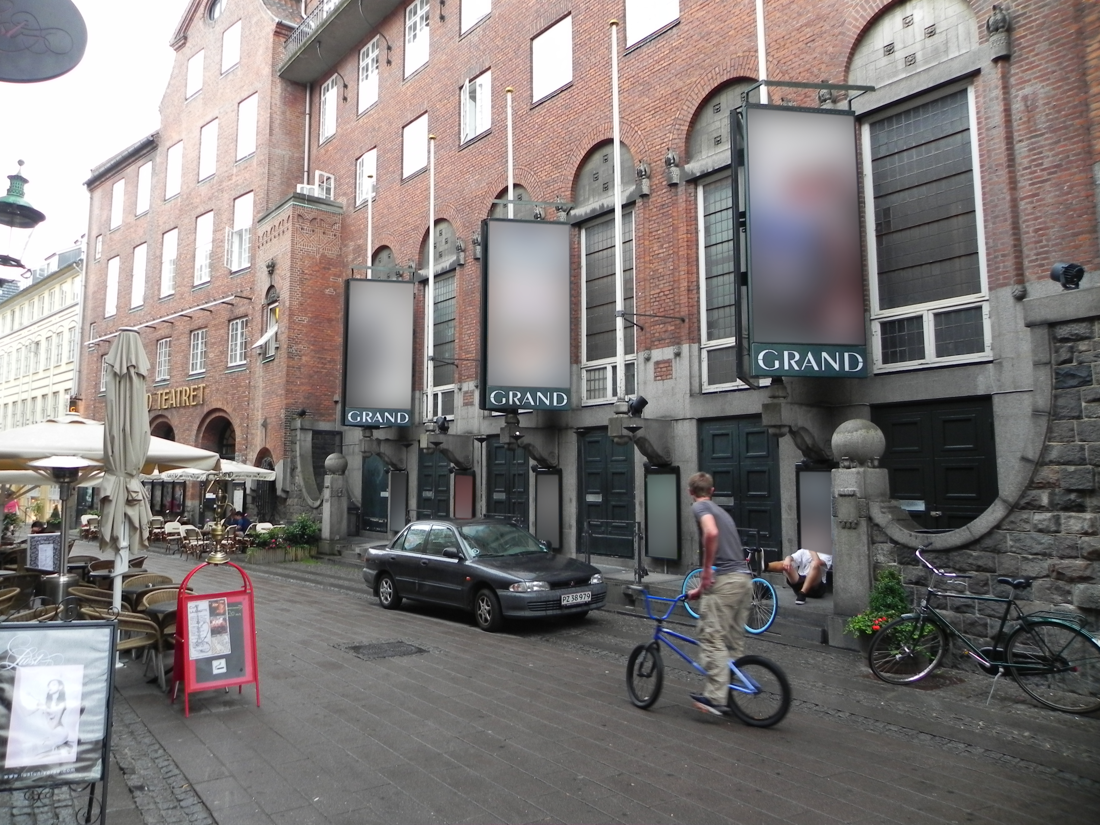 Copenhague